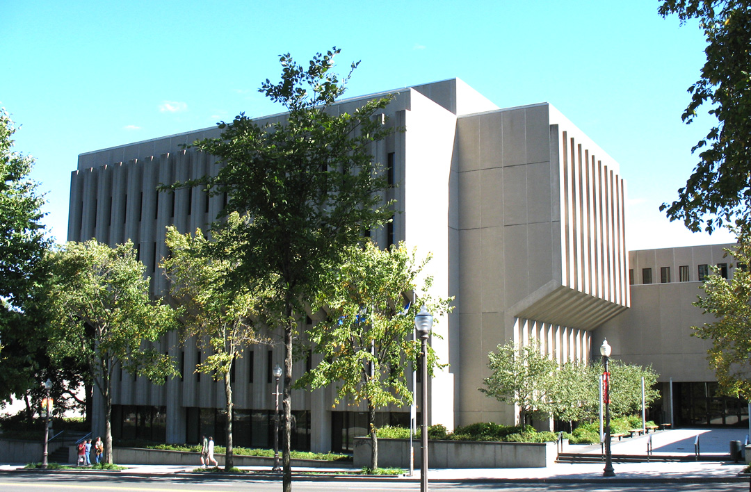 Édifices H et J à Québec. Conseil exécutif, salle du Conseil des ministres bureau du premier ministre du Québec